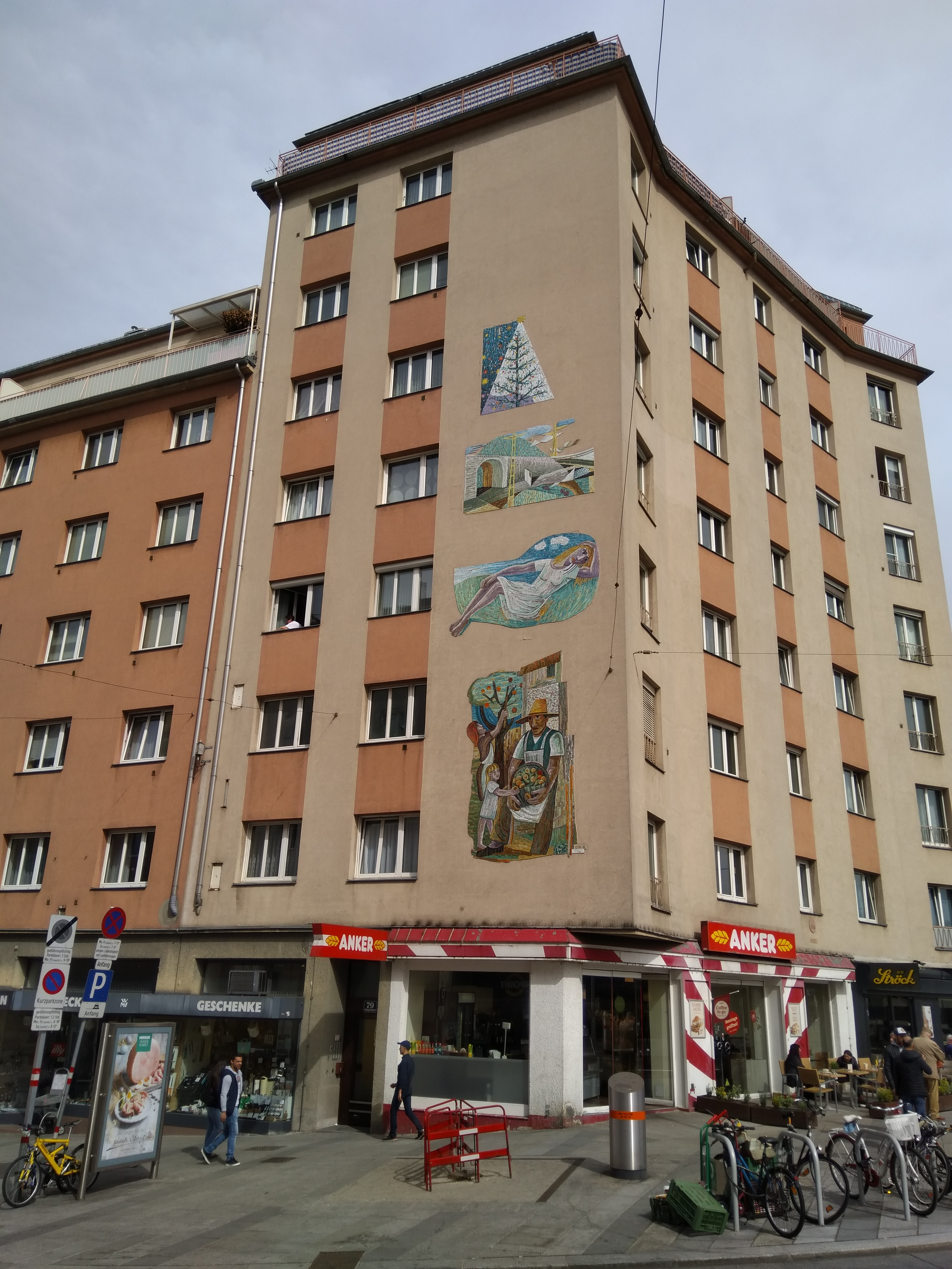 Mosaik am Gebäude Meidlinger Hauptstraße 79, 1120 Wien